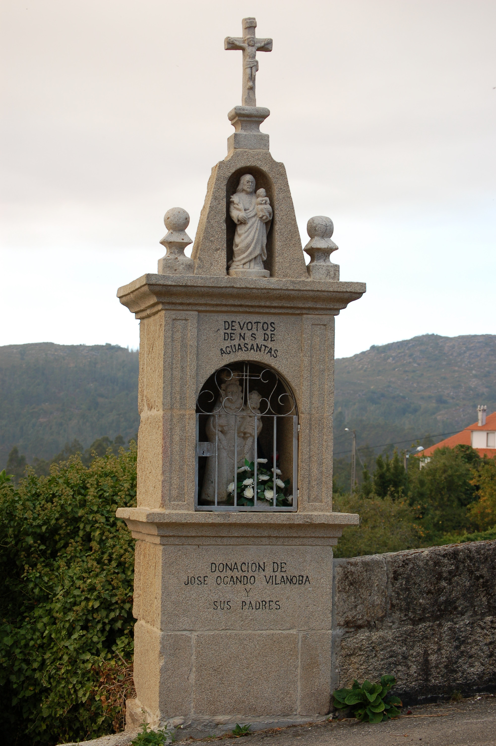 Peto de ánimas no Igrexario, Aguasantas (Cerdedo-Cotobade)